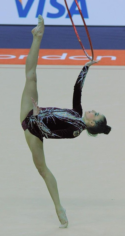 Berezko-Marggrander beim vorolympischen Qualifikationswettkampf in London (06—2012)